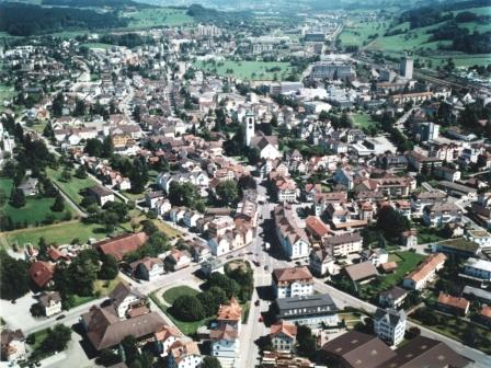 Flugaufnahme vom Gossauer Stadtzentrum